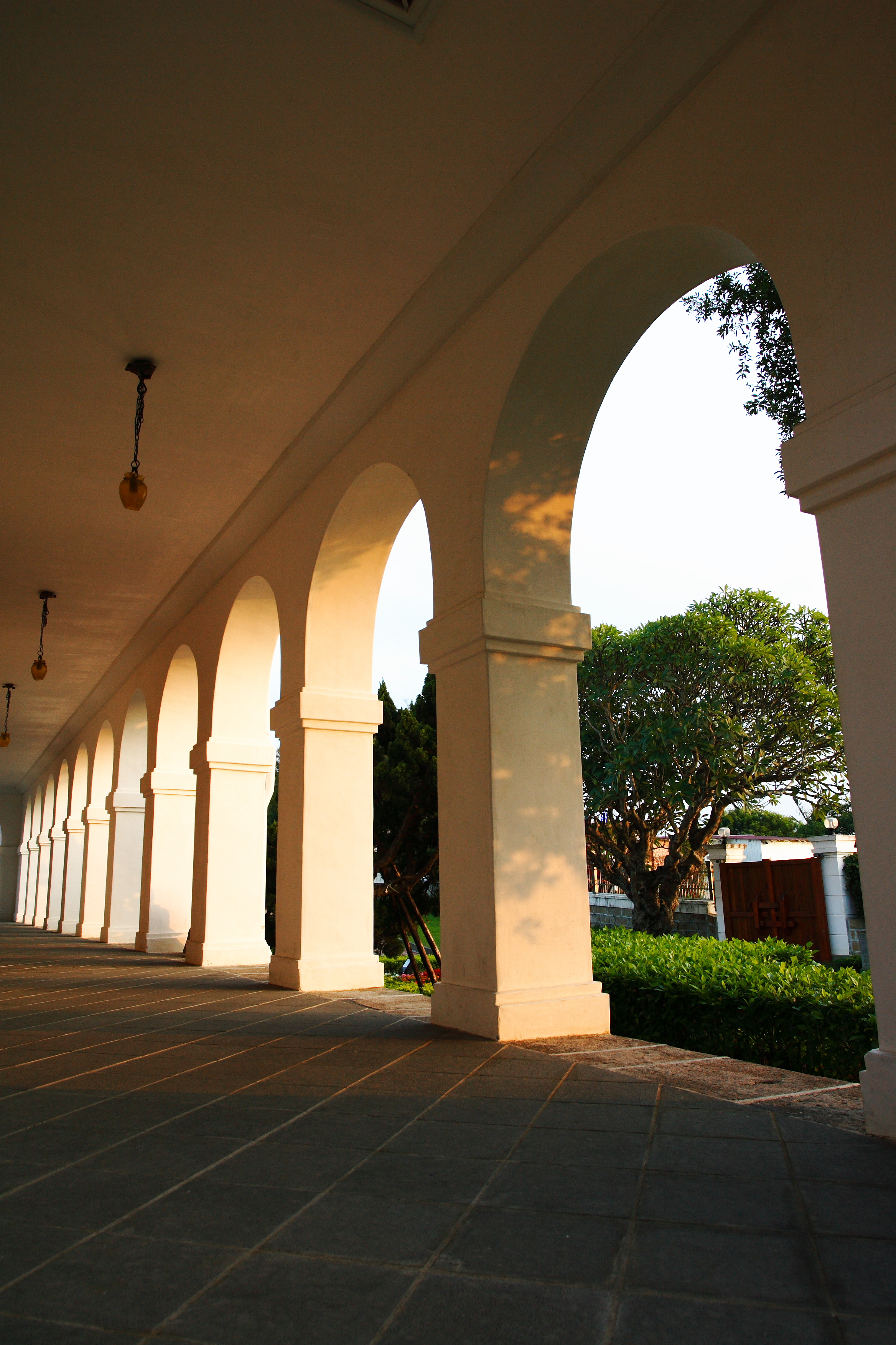 淡水藝遊網‧小白宮迴廊